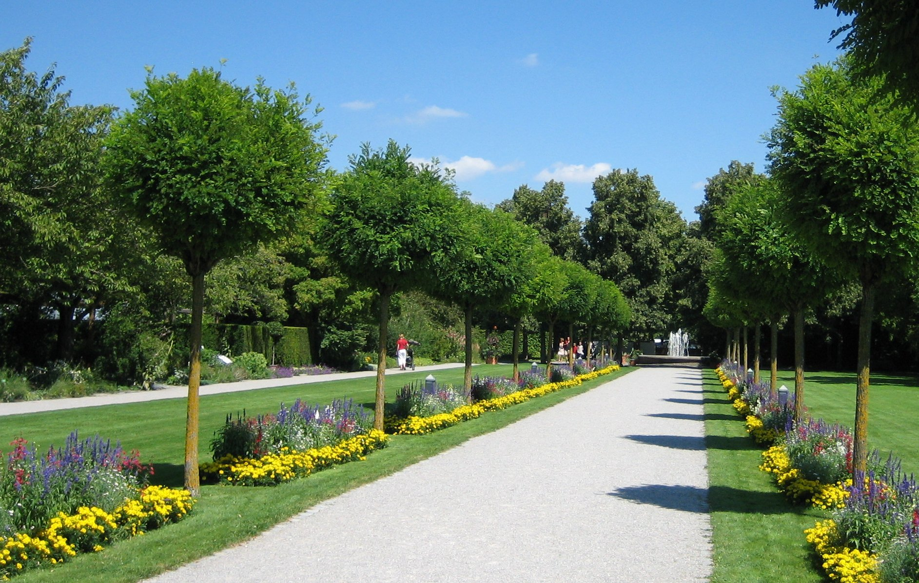 Botanischer Garten in Augsburg, Blick zum Ein- und Ausgang